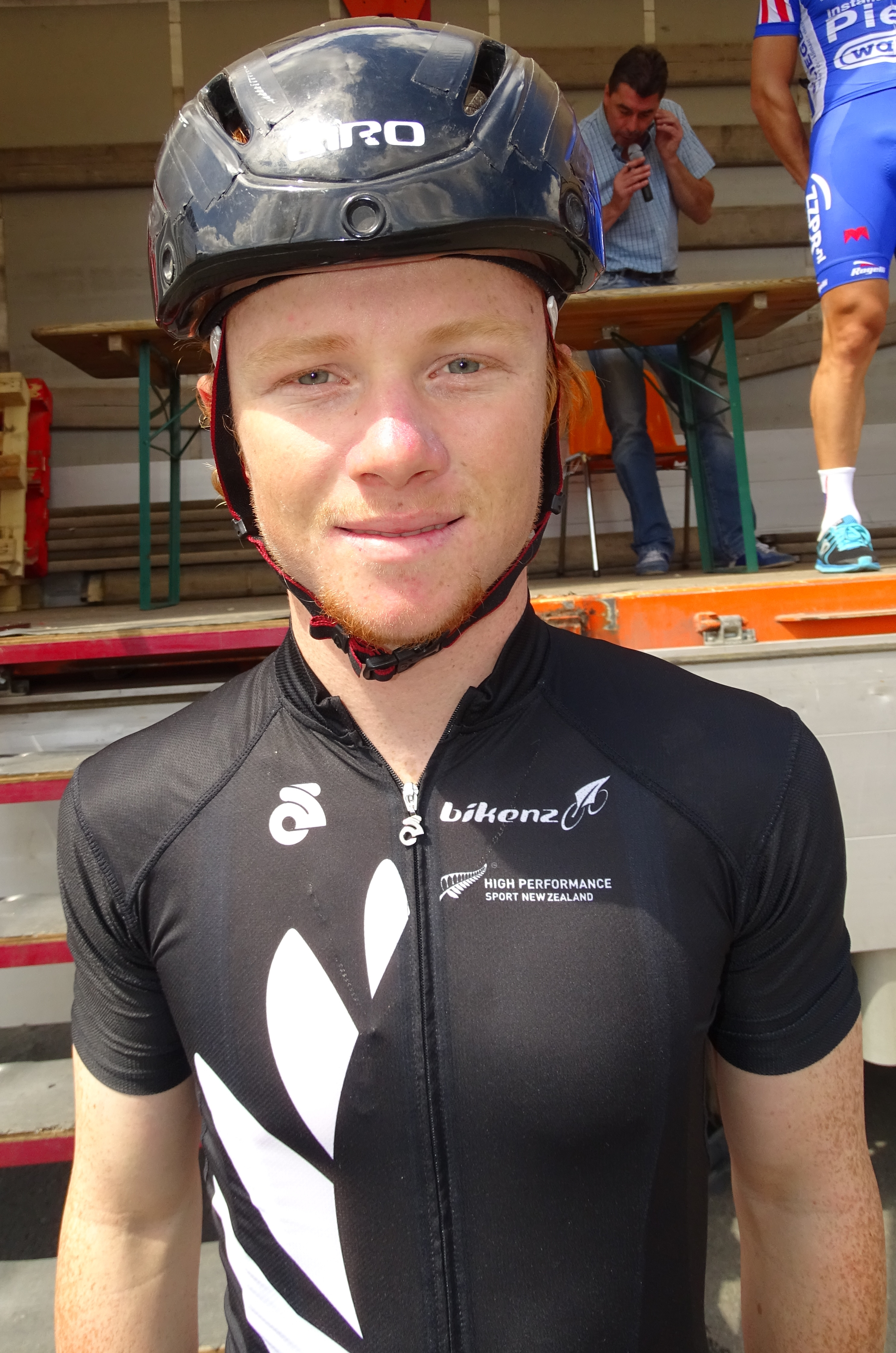 Reportage réalisé le dimanche 7 juin à l'occasion du départ du Mémorial Philippe Van Coningsloo 2015 à Wavre, Belgique.